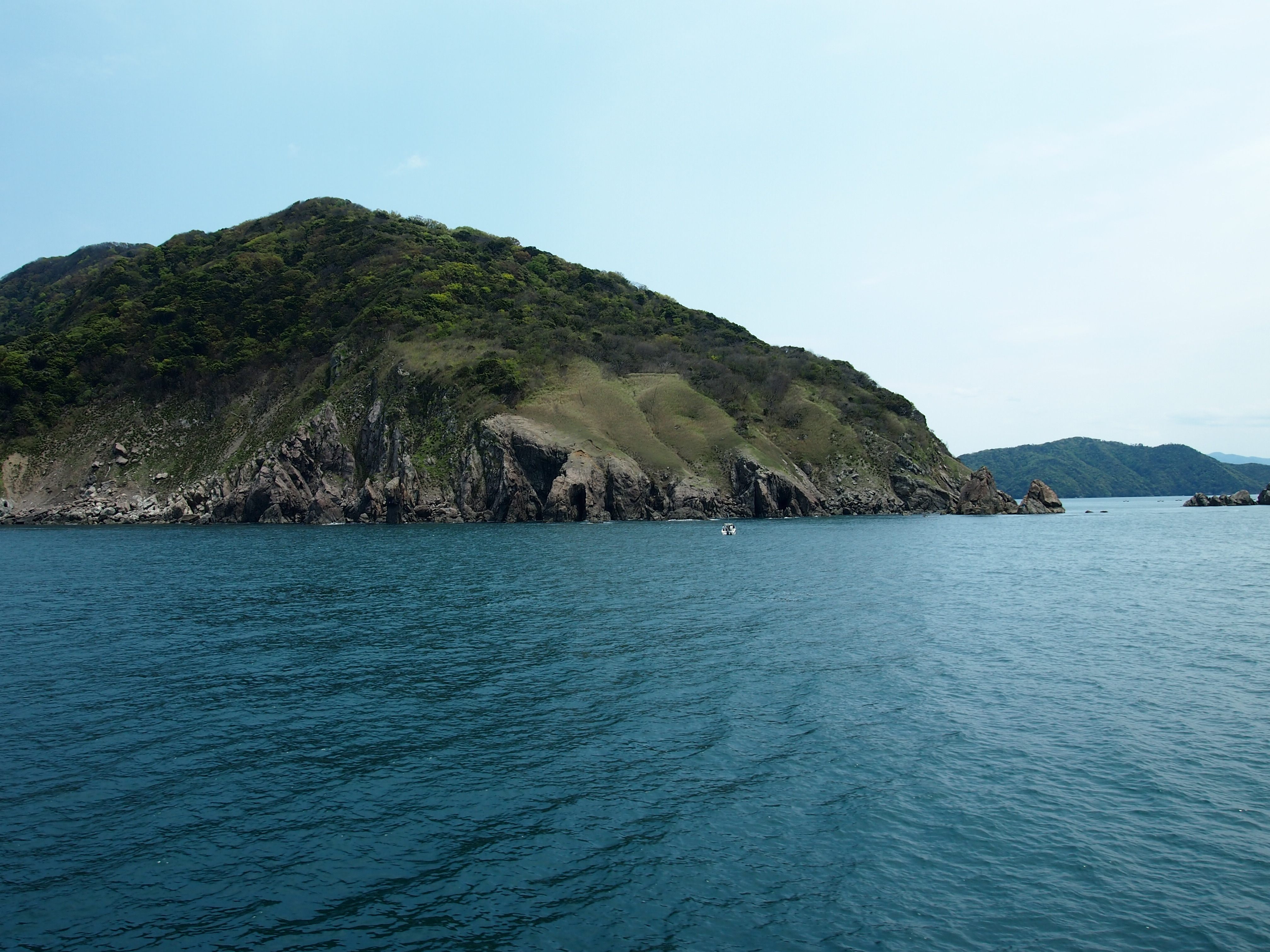 福井県内外海半島の松ヶ崎を蘇洞門めぐり遊覧船から望む。